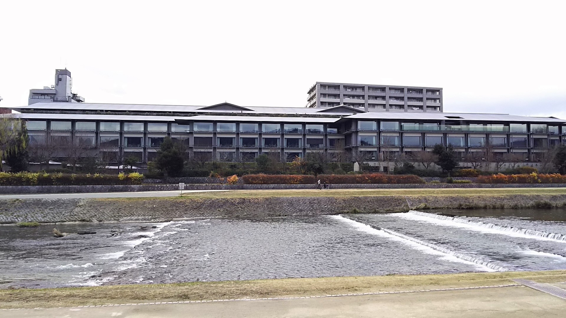 ザ・リッツ・カールトン京都 鴨川の対岸から撮影（京都市中京区）